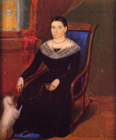 Retrato de Rosa Rodríguez Riquelme (Rosa O’Higgins) por Bernardo Rosa O’Higgins. Rosa O'Higgins (* Chillán Viejo, Región del Biobío, Chile 1781 - † Lima, Perú 1850), chilena hija de Isabel Riquelme y Félix Rodríguez Rojas. En los años de la lucha de la independencia chilena adoptó el apellido de su medio hermano Bernardo O'Higgins con quien viviese sus primeros años de su niñez.